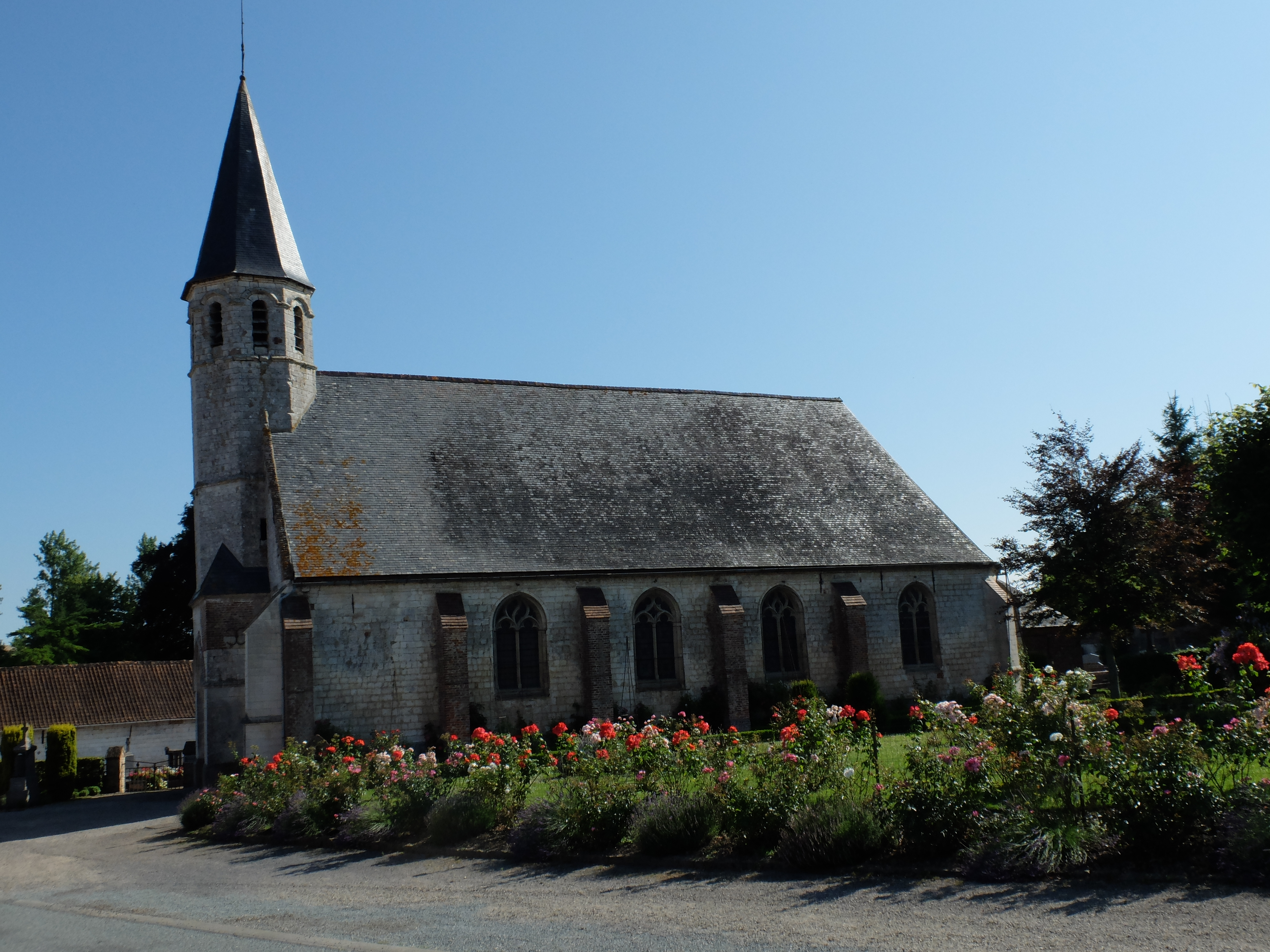 Vue de l'église Saint-Georges de Saint-Georges (Pas-de-Calais). .